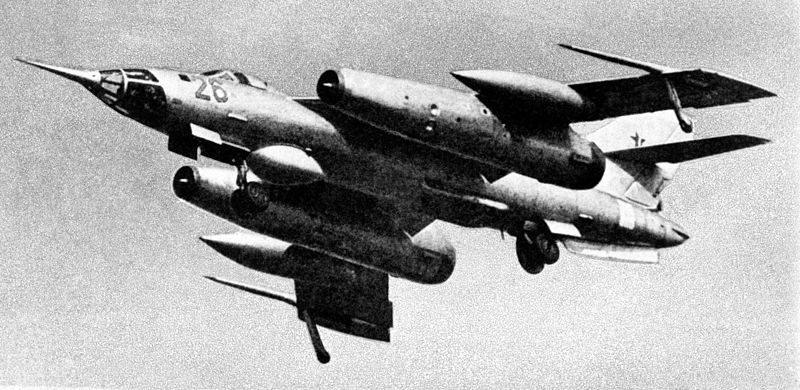 A left underside view of a Soviet Yak-28 Brewer-C aircraft. Date Shot: 26 Mar 1985